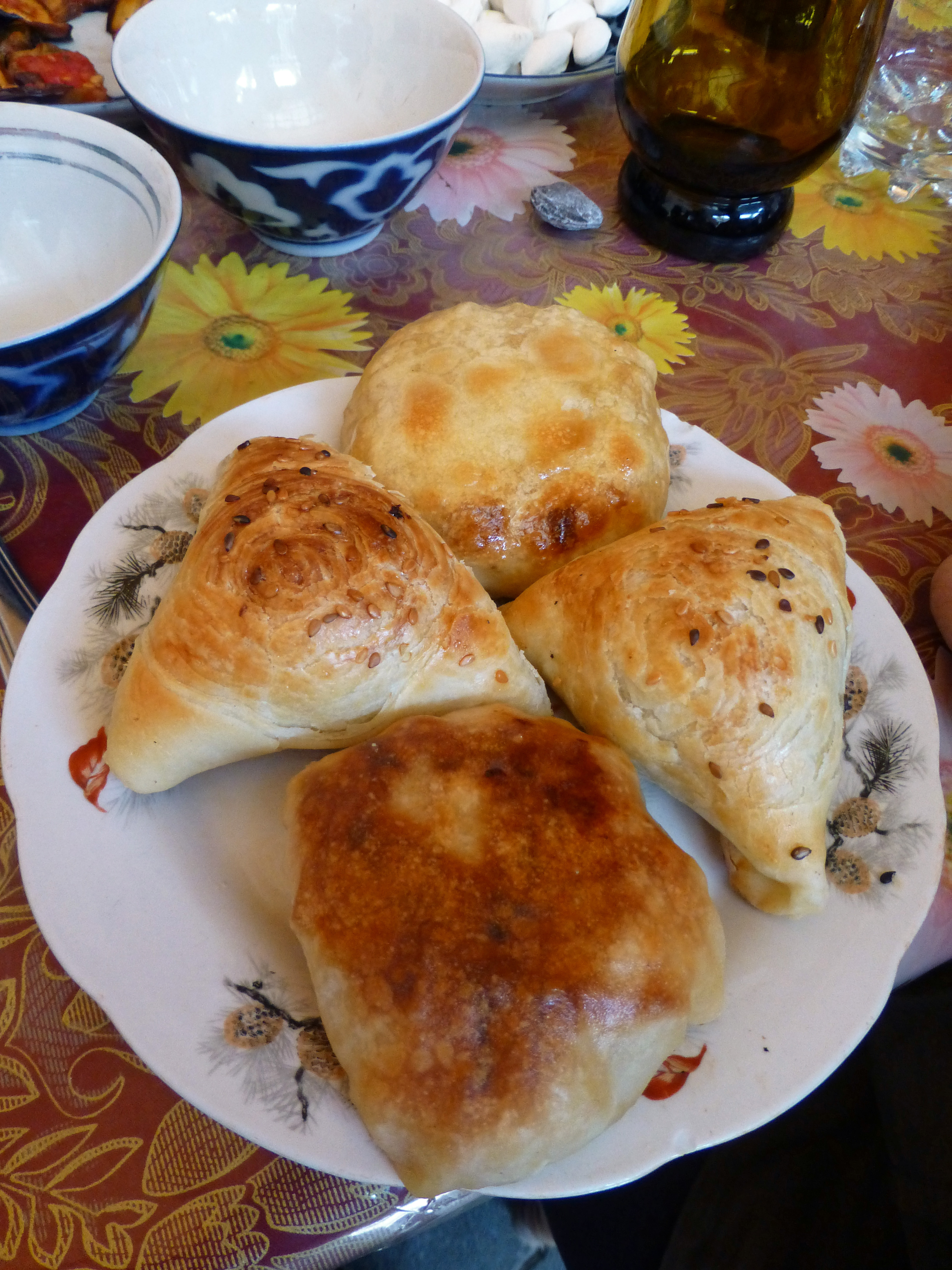 Ouzbékistan : samsas